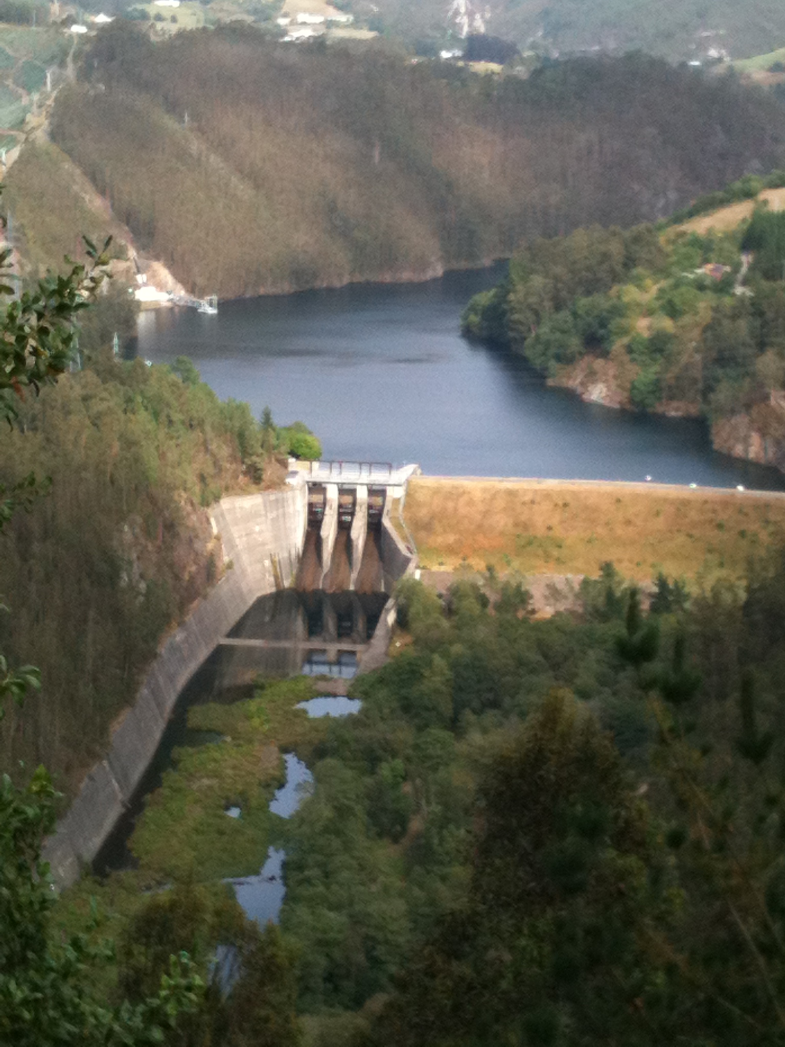 Embalse de Arbón (Asturias)